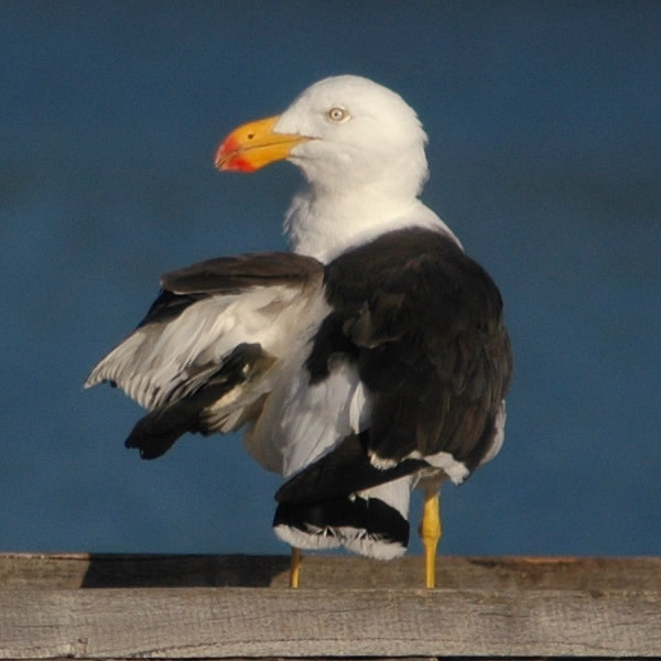 Bird, Pacific Gull, Larus pacificus